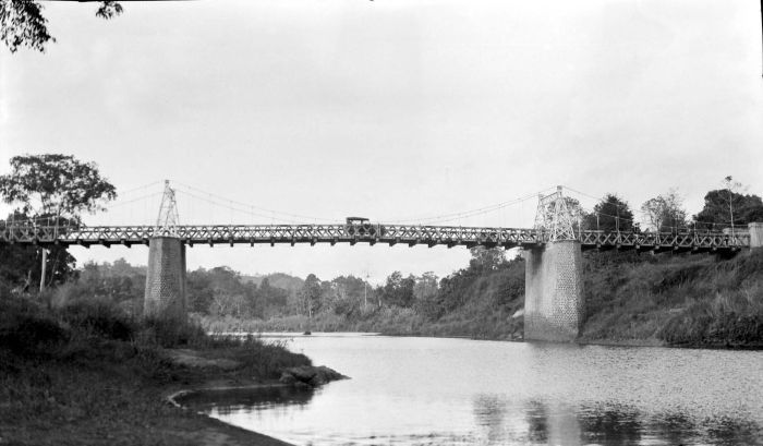 Negatief. Een auto rijdt op een brug over de rivier Walanae in Watansoppeng, Zuid Celebes